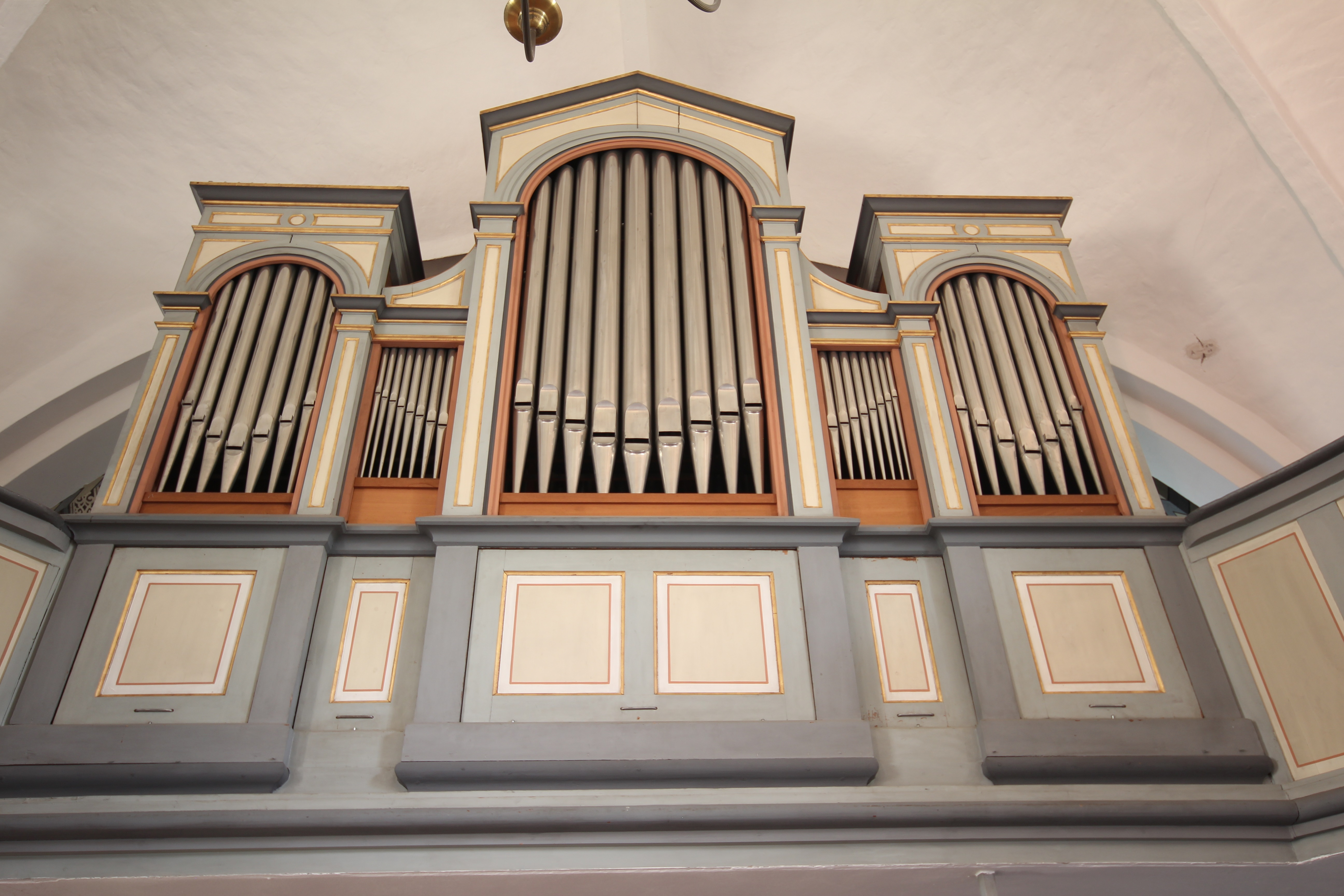 Prospekt der Marcussen-Orgel in der St. Petri-Kirche zu Rieseby